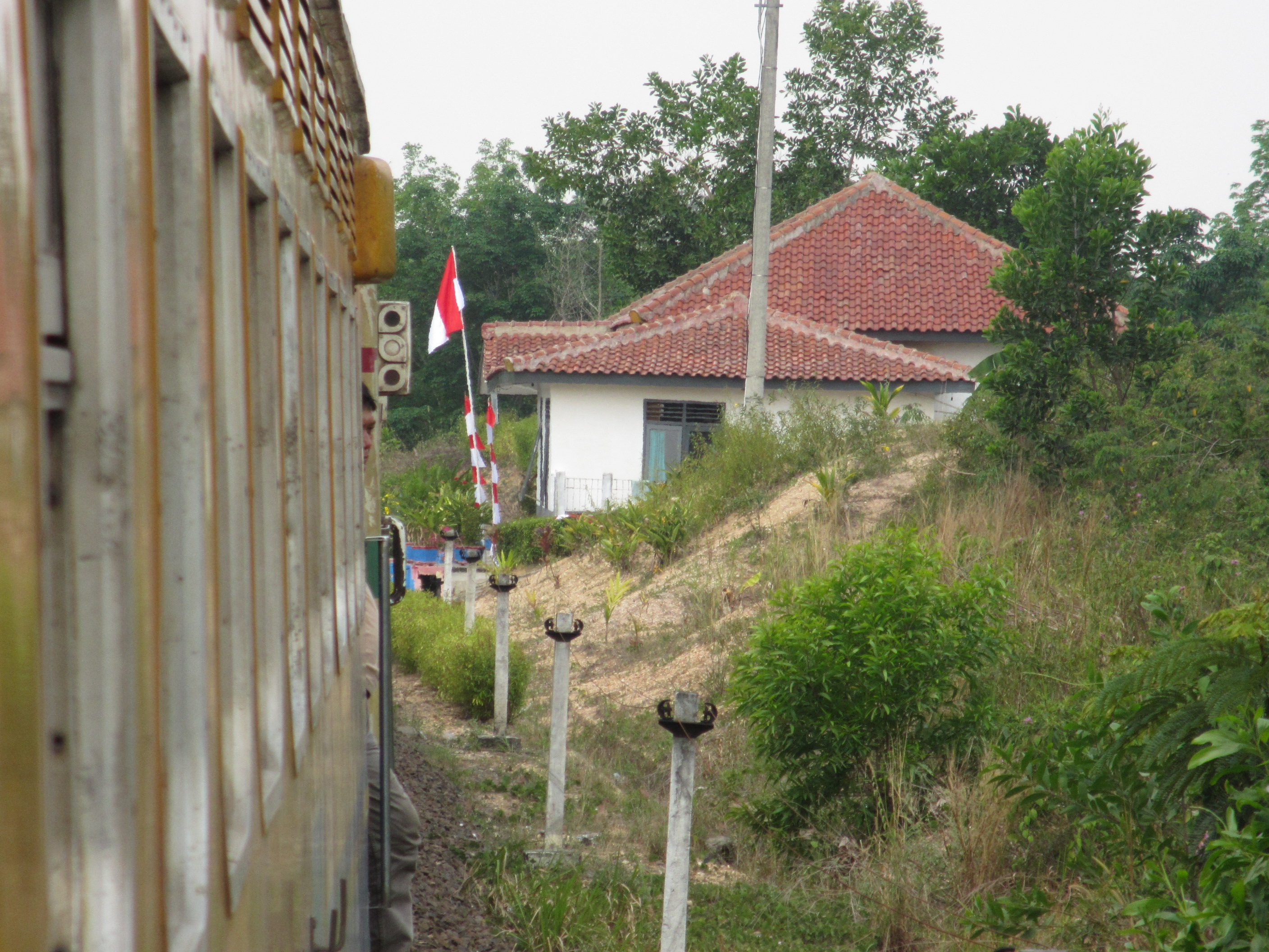 Stasiun Tanjungrajo.